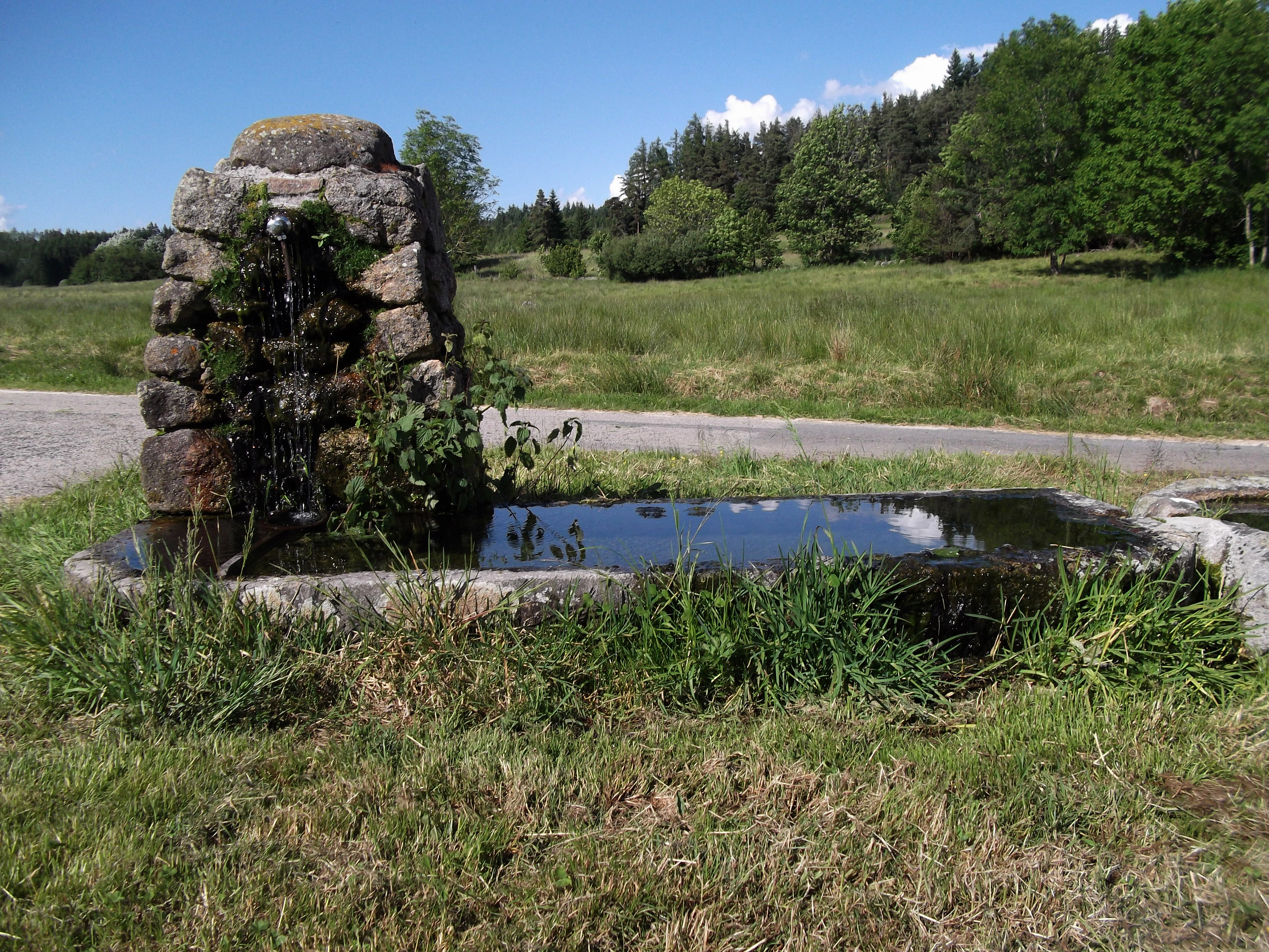 Un abreuvoir en pierres situé au hameau de Daniecq